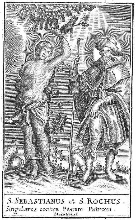 Gedenkbildchen aus dem 17. Jh.